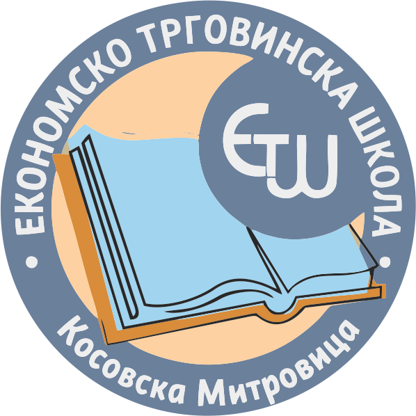 Српски (ћирилица): Лого Економско-трговинска школа Косовска Митровица